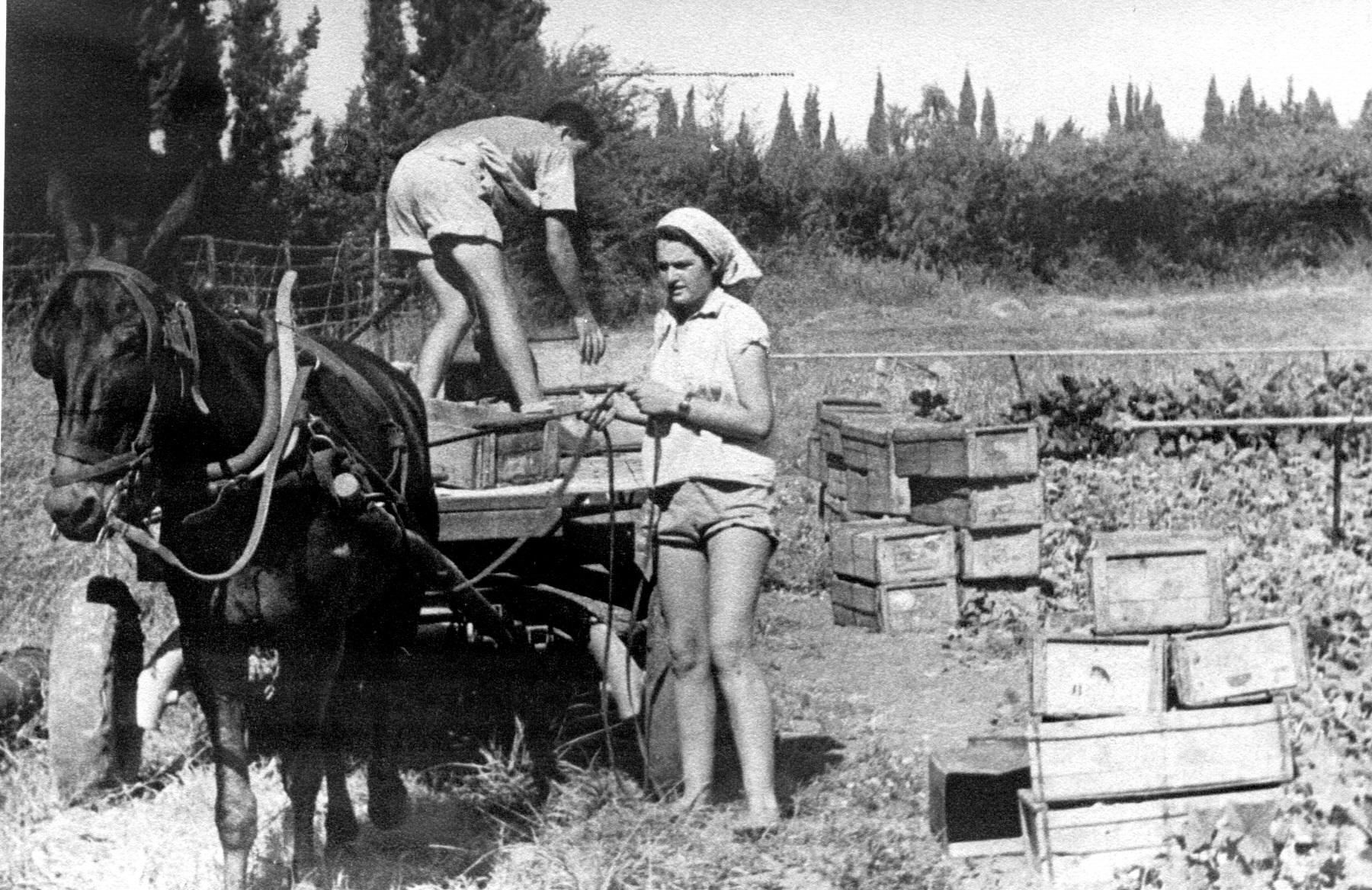 איסוף ארגזי גזר בעזרת עגלה רתומה לסוס.